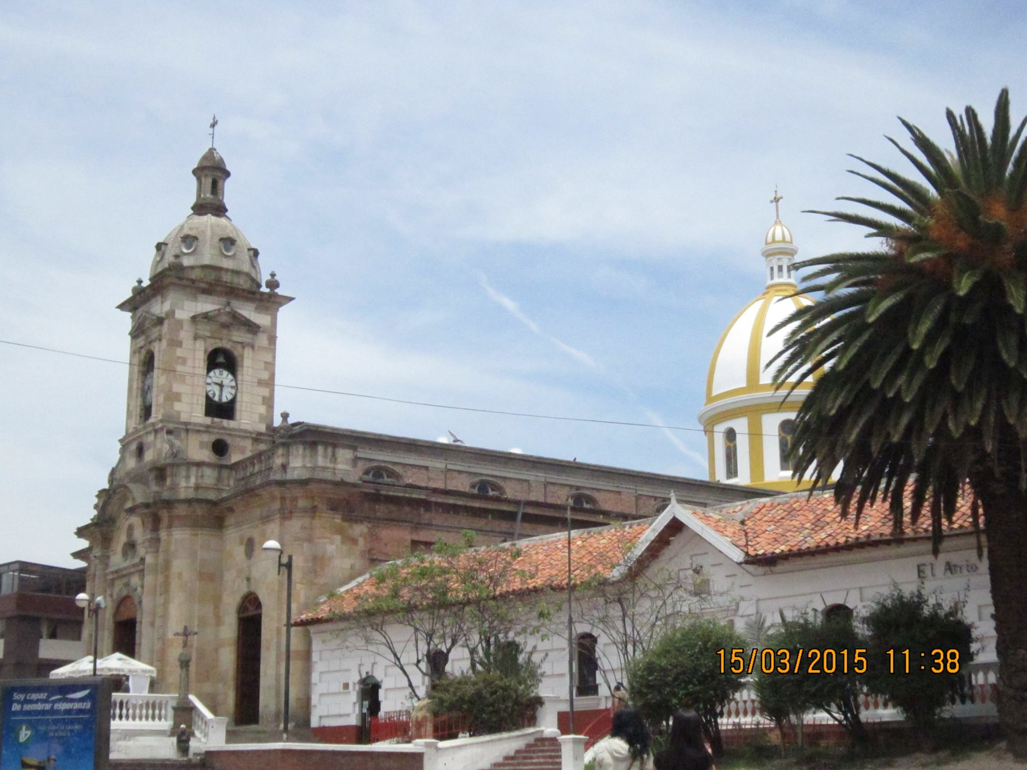 Foto de las ultimas tomadas a la iglesia central de paipa